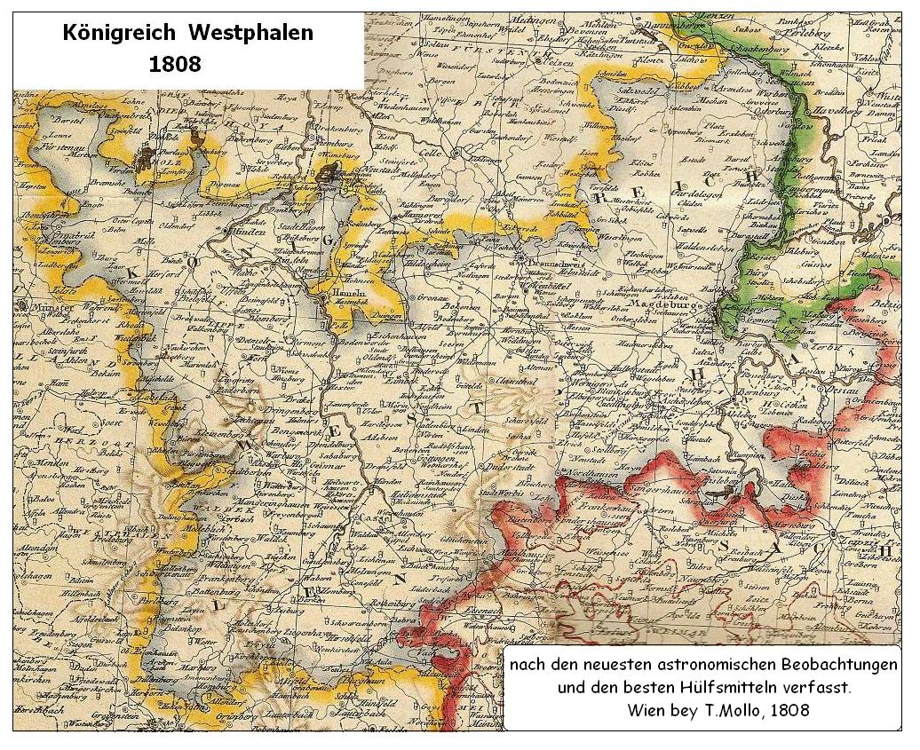 Ausschnitt aus der Karte "Die Königreiche Sachsen und Westphalen" Wien bey T. Mollo, 1808